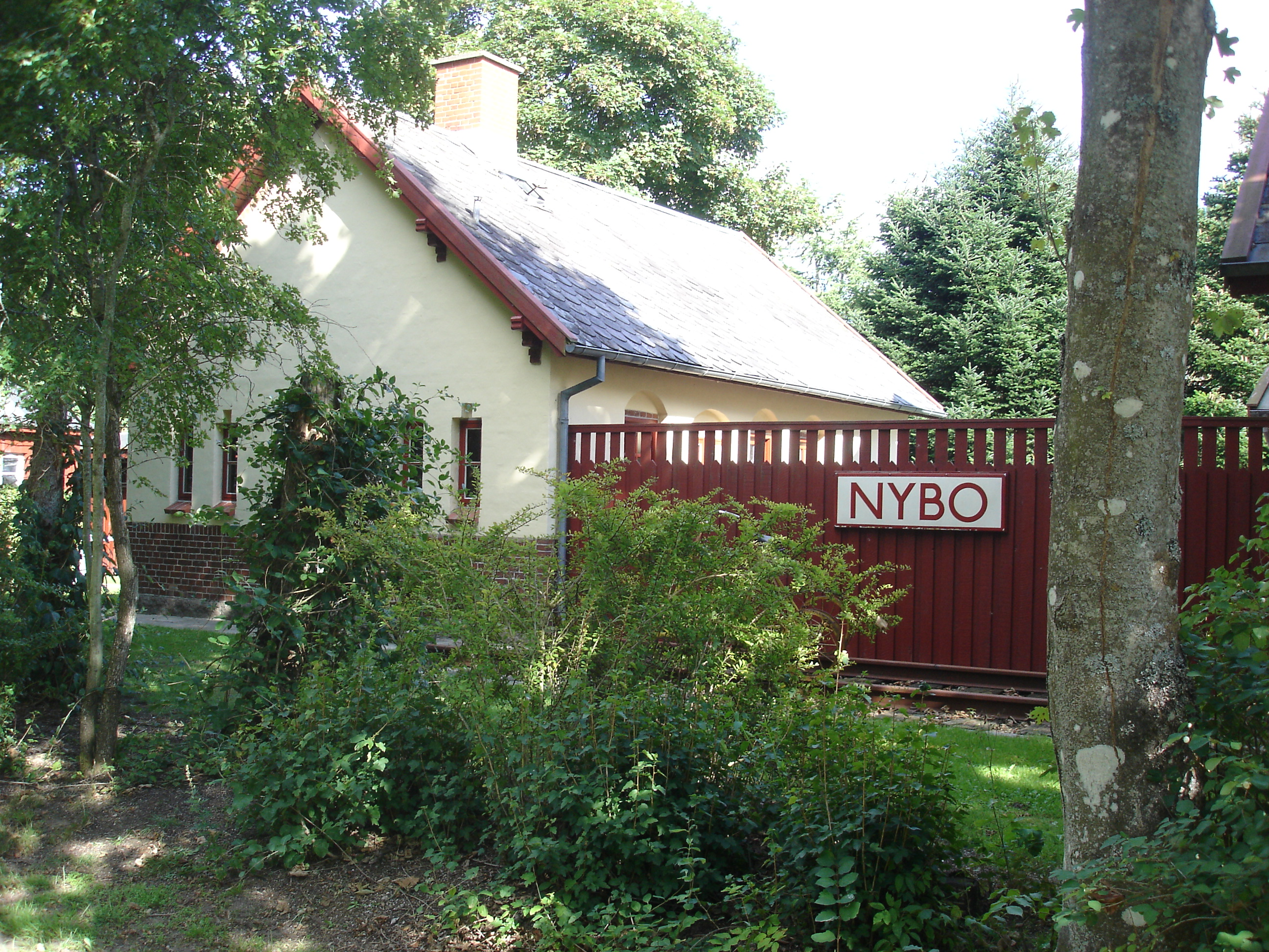 Nybo billetsalgssted fra sporsiden